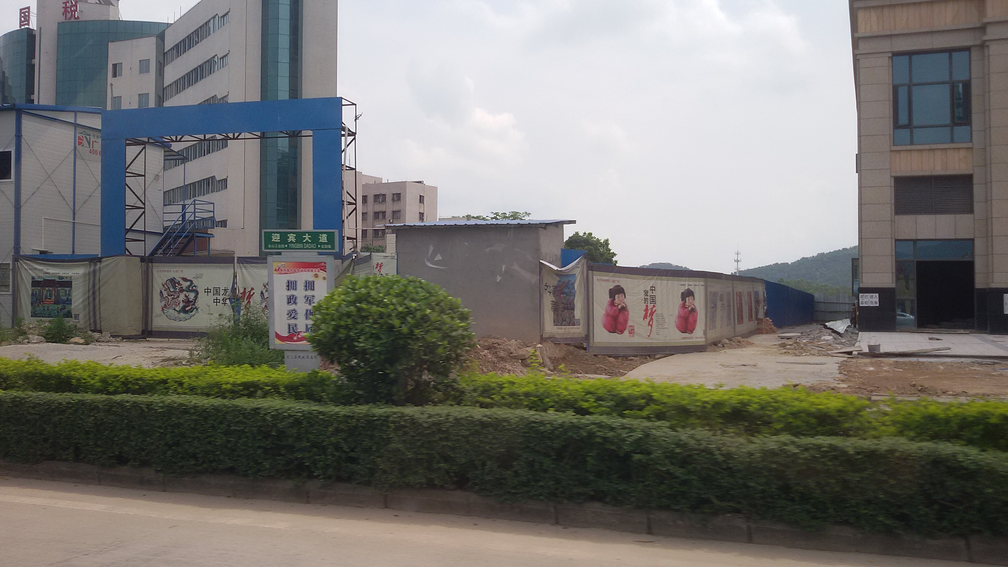 粵語: 惠州龍門縣迎賓大道